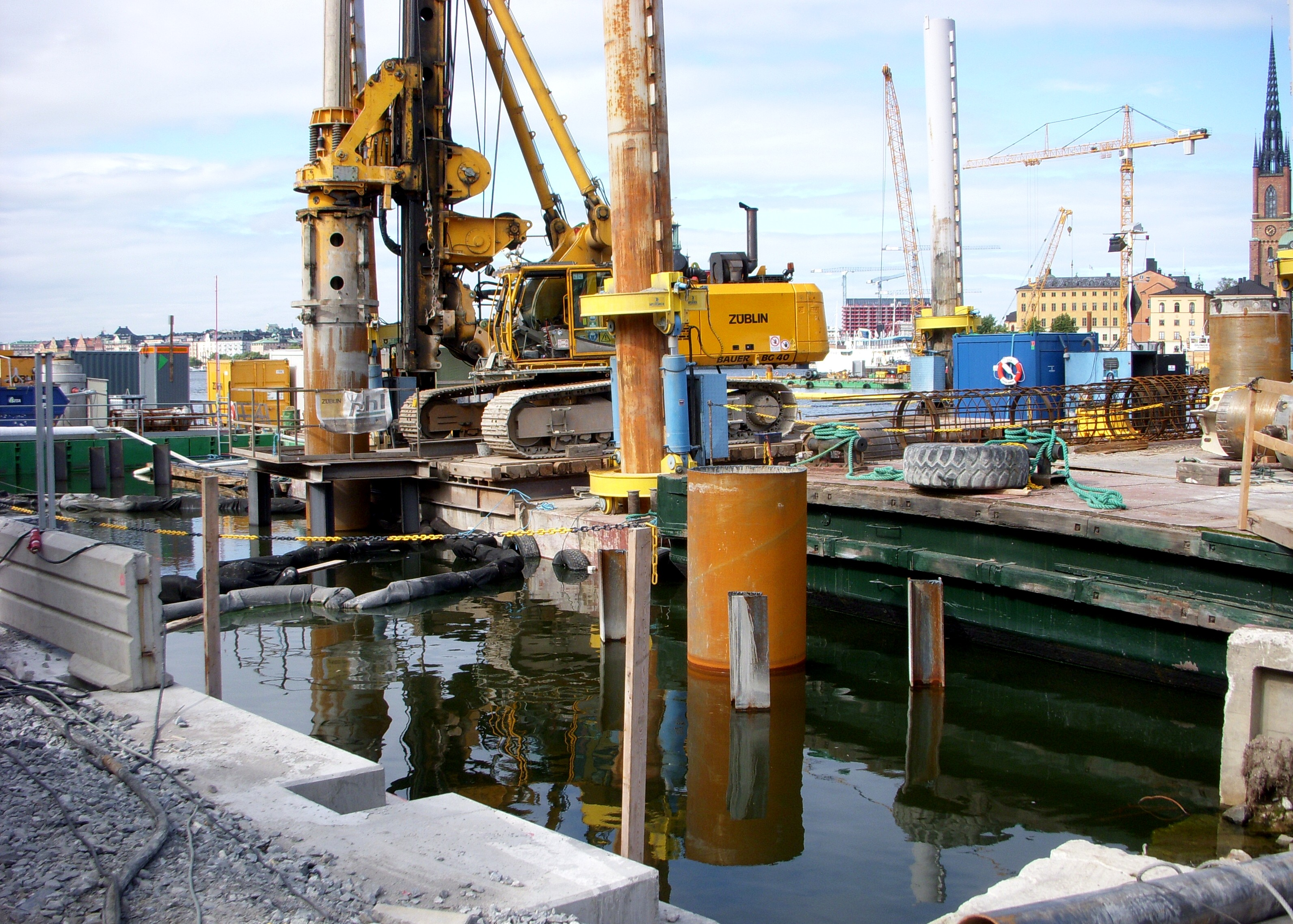 Arbeten med Citybanan vid Söder Mälarstrand